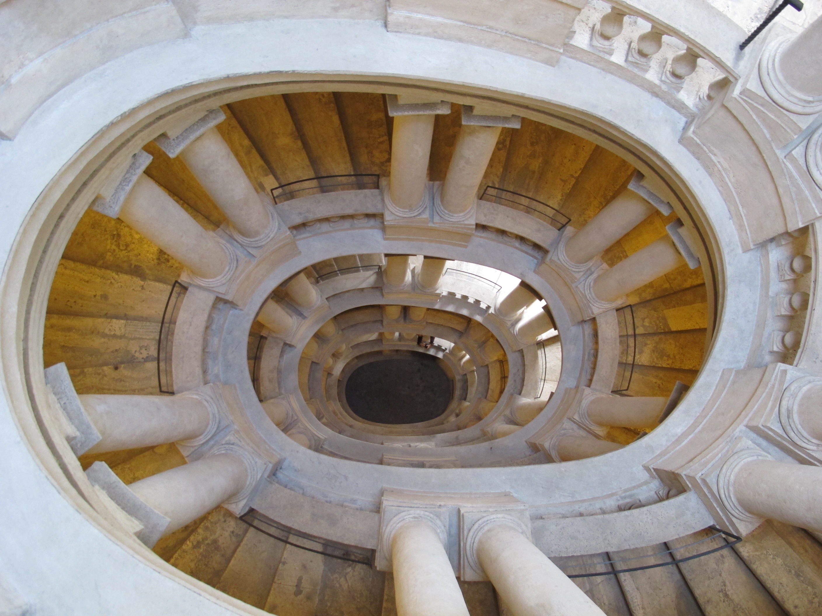 Palazzo barberini, scalone del borromini